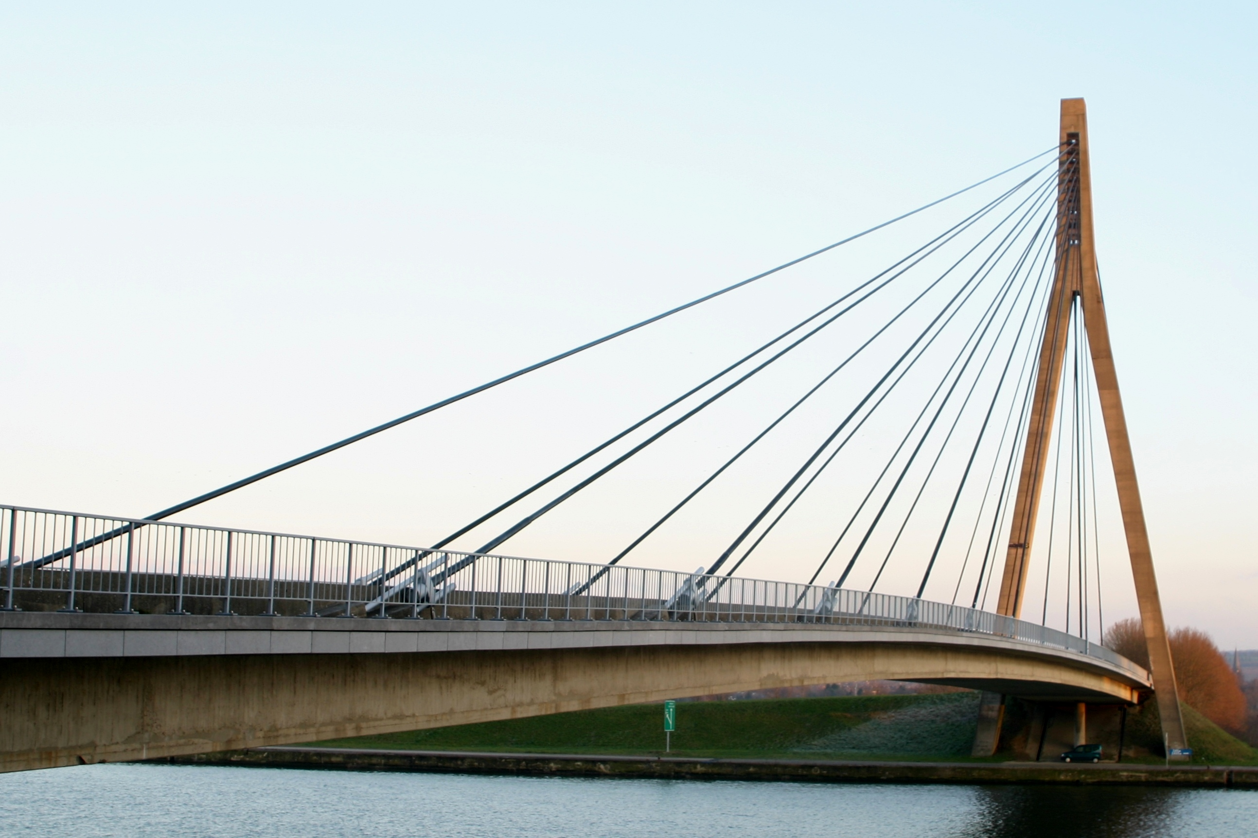 Bréck vu Lanaye vum lénken Uwänner gesinn.